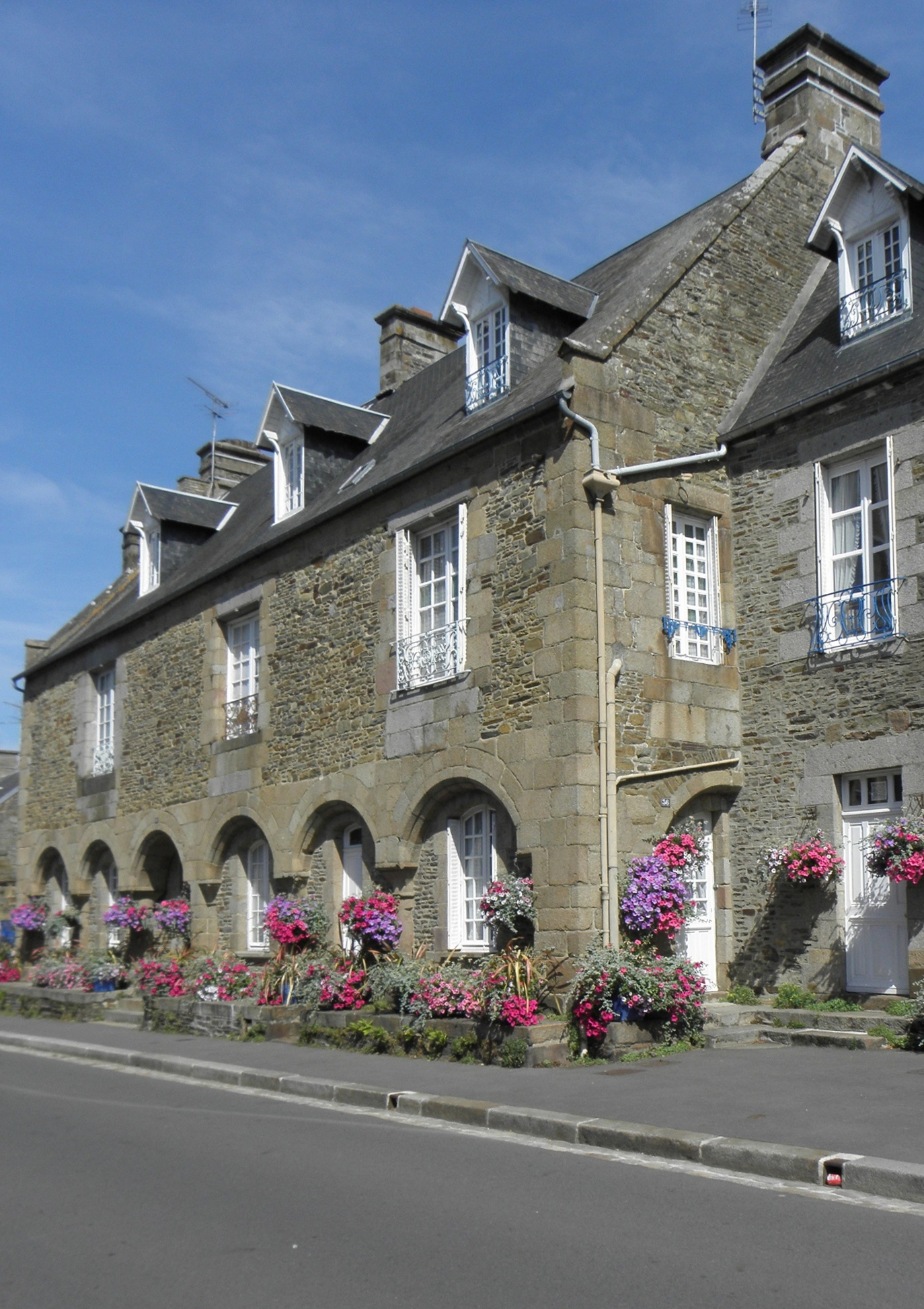 Hôtel Guiscard de la Ménardière sis commune de Pontorson (50).